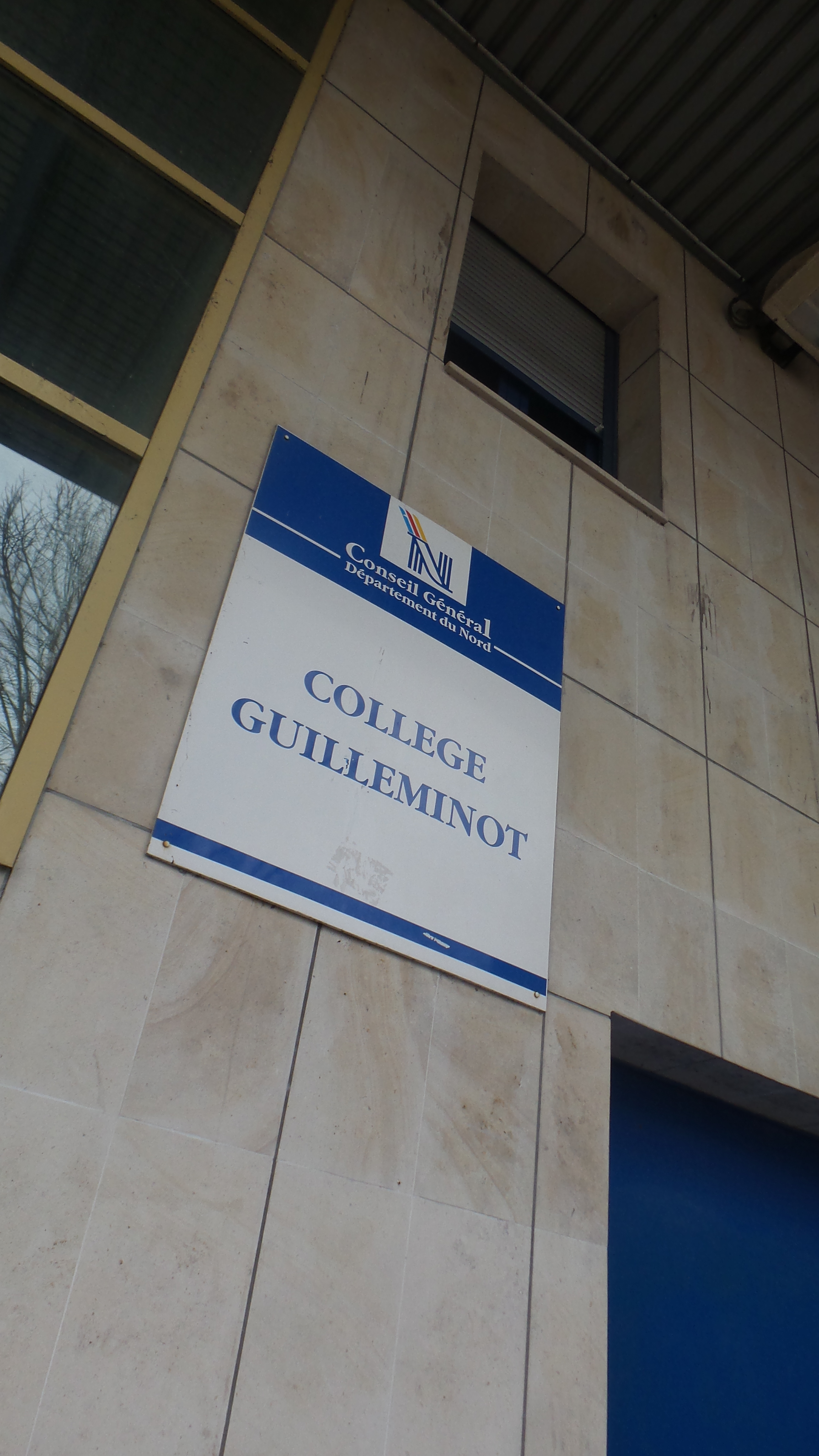 Exemple d'une plaque nominative émise par le Conseil Général Département du Nord : La plaque nominative du Collège Guilleminot